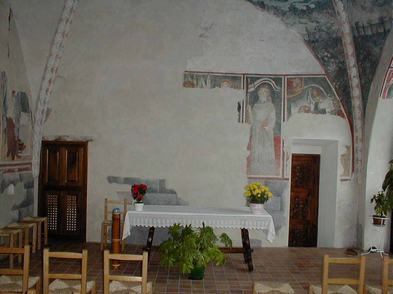 vista interna dopo il restauro